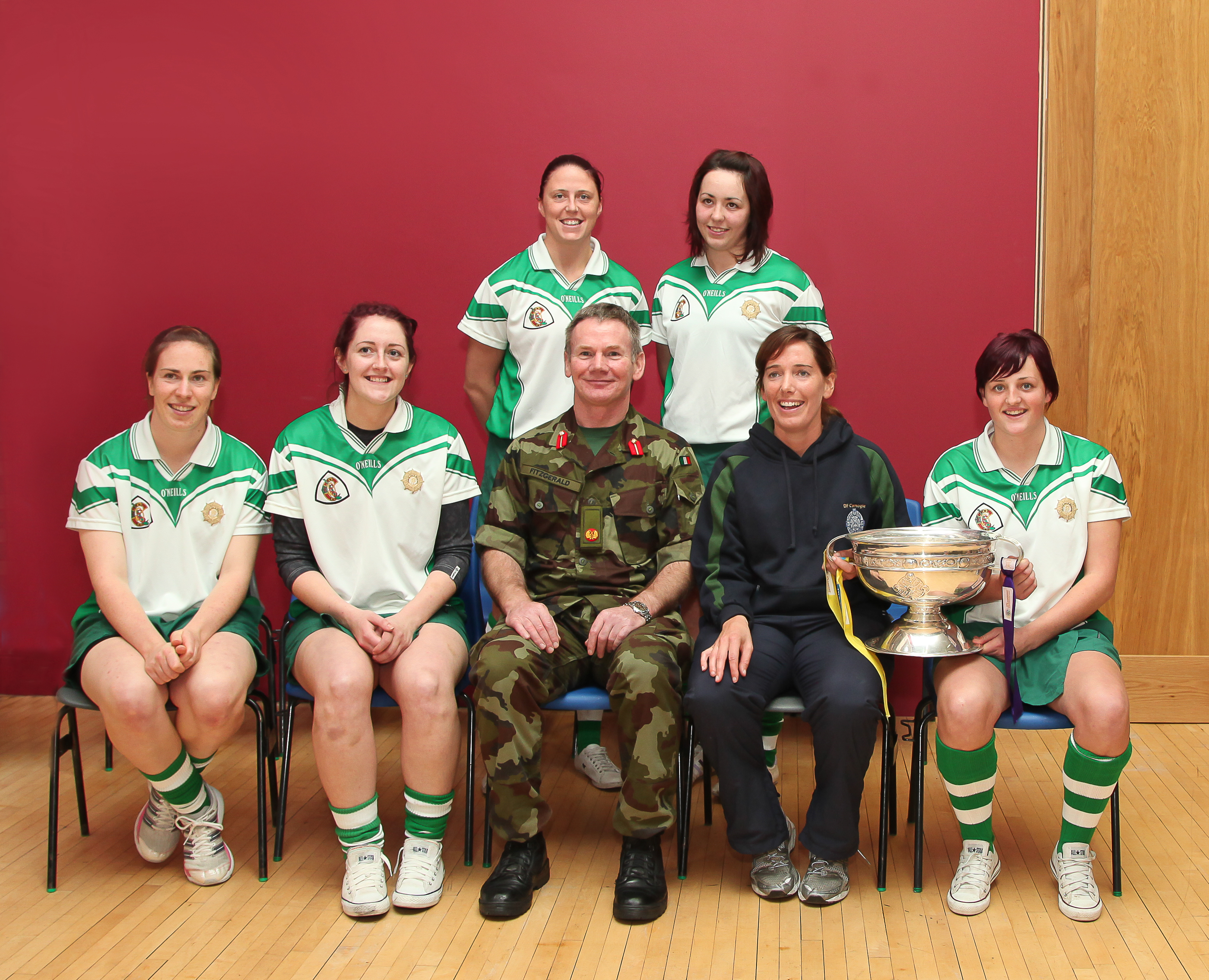 Camogie Game 24/10/12